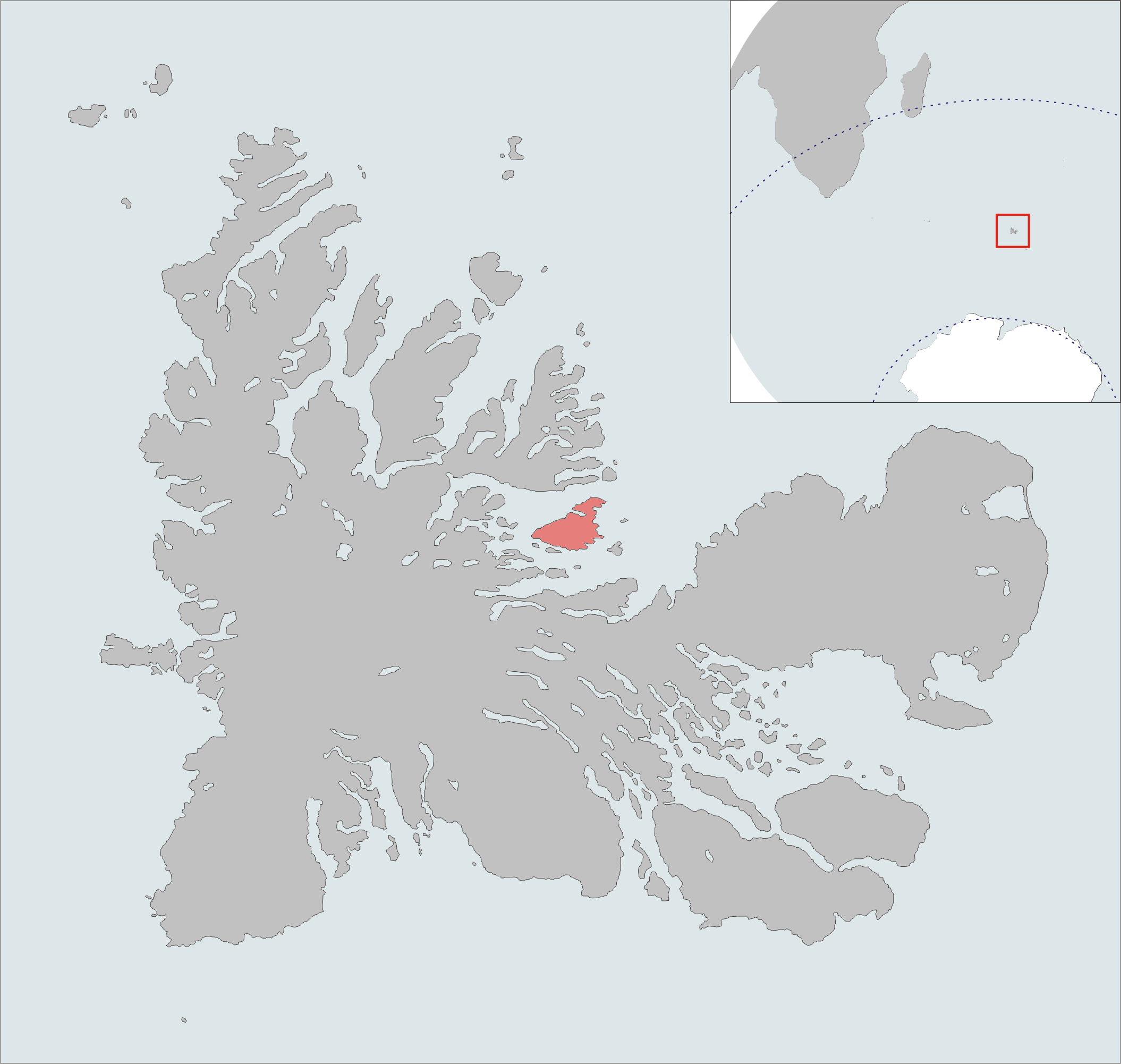 Carte